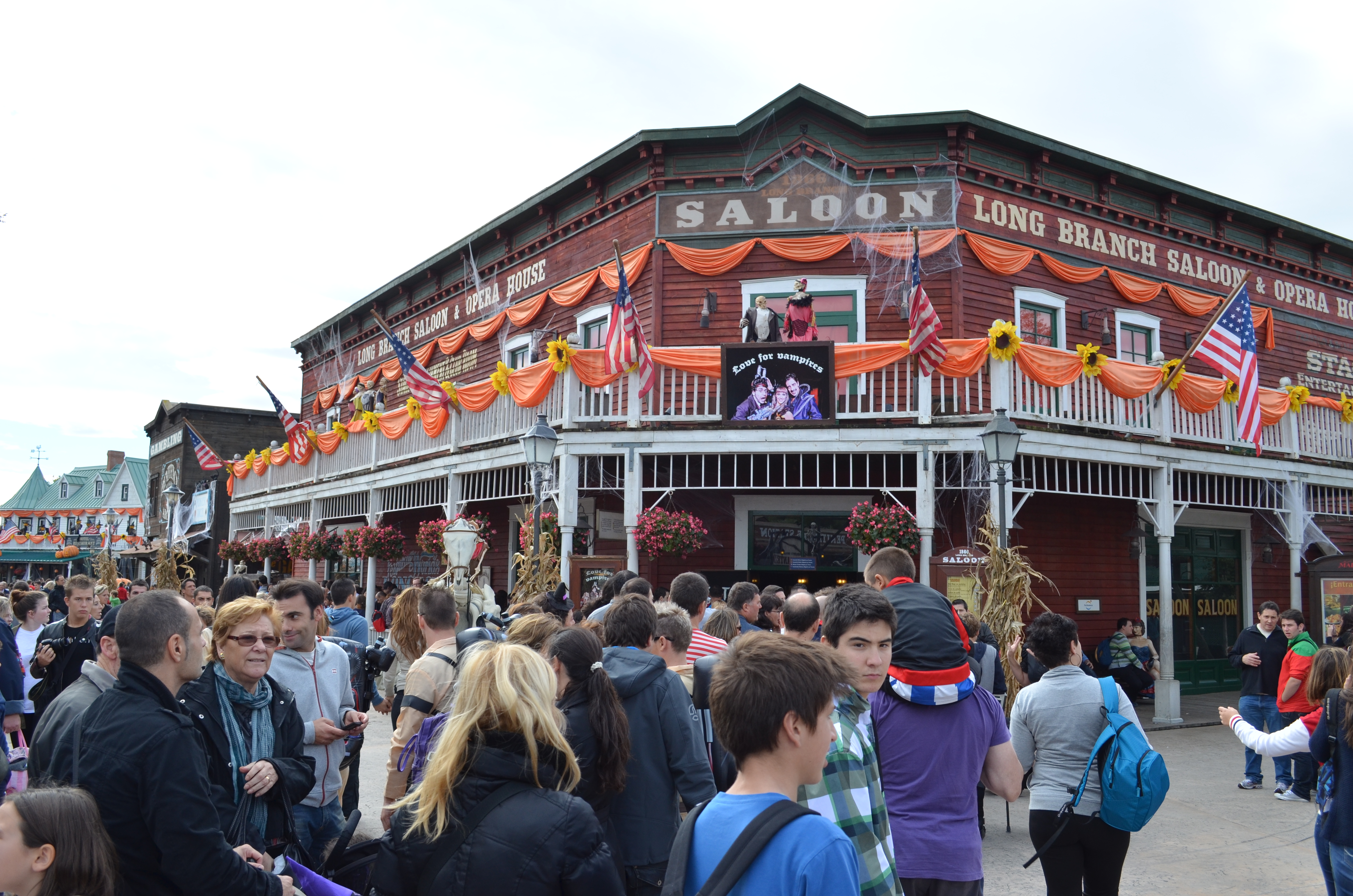 Sallon Roxy en Halloween 2012